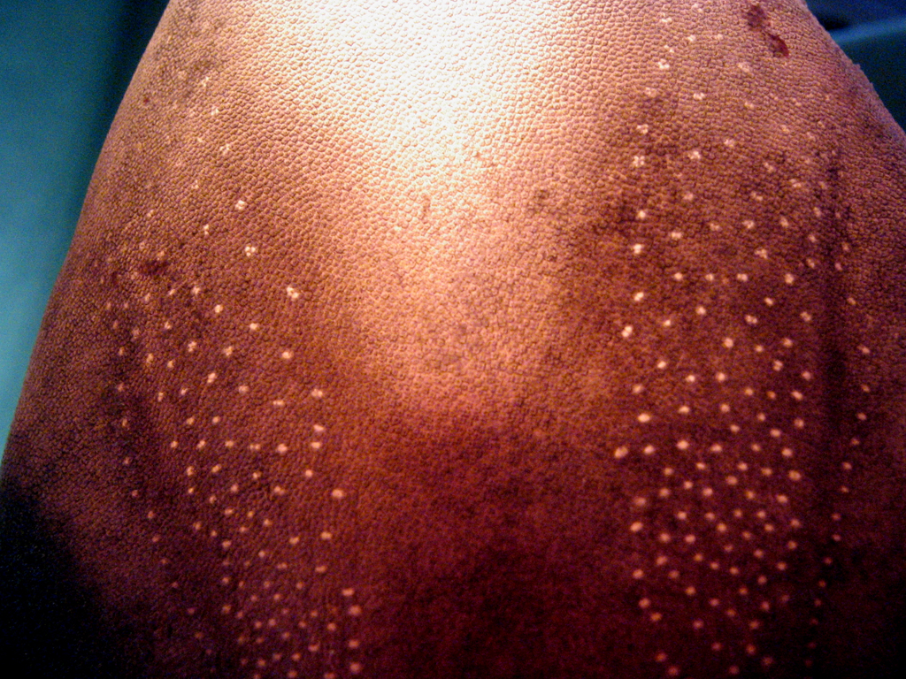 Museau d'aiguillat commun (Squalus acanthias), vu partiellement par transparence.